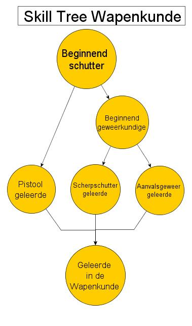 Een voorbeeld van een skill tree, in dit geval over wapenkunde.